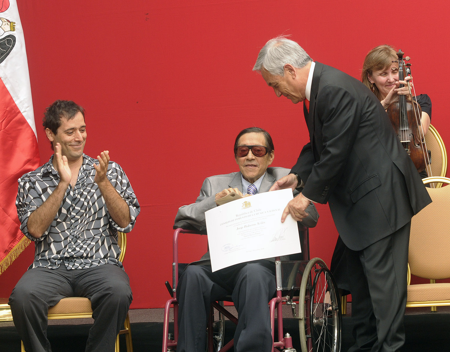 En una ceremonia realizada en el Palacio de La Moneda, el Presidente Piñera anunció el envío al Congreso en los próximos días de un proyecto de ley “que va a hacer permanente la entrega de incentivos económicos para aquellas radios u otros medios de comunicación que difundan la música chilena”. En la foto, Jorge Pedreros recibe el premio del Presidente Piñera.